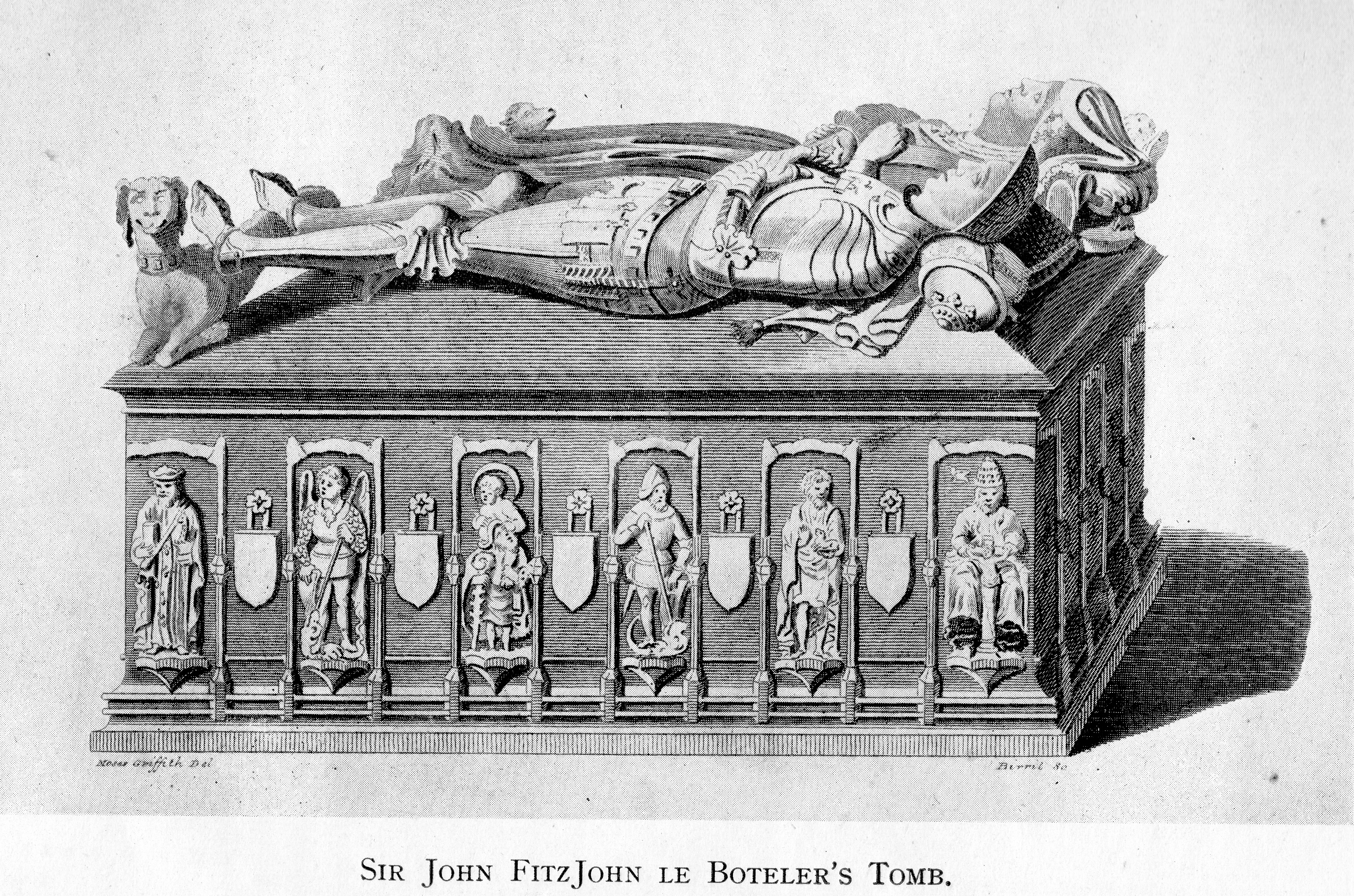 Sir John FitzJohn Le Boteler's Tomb